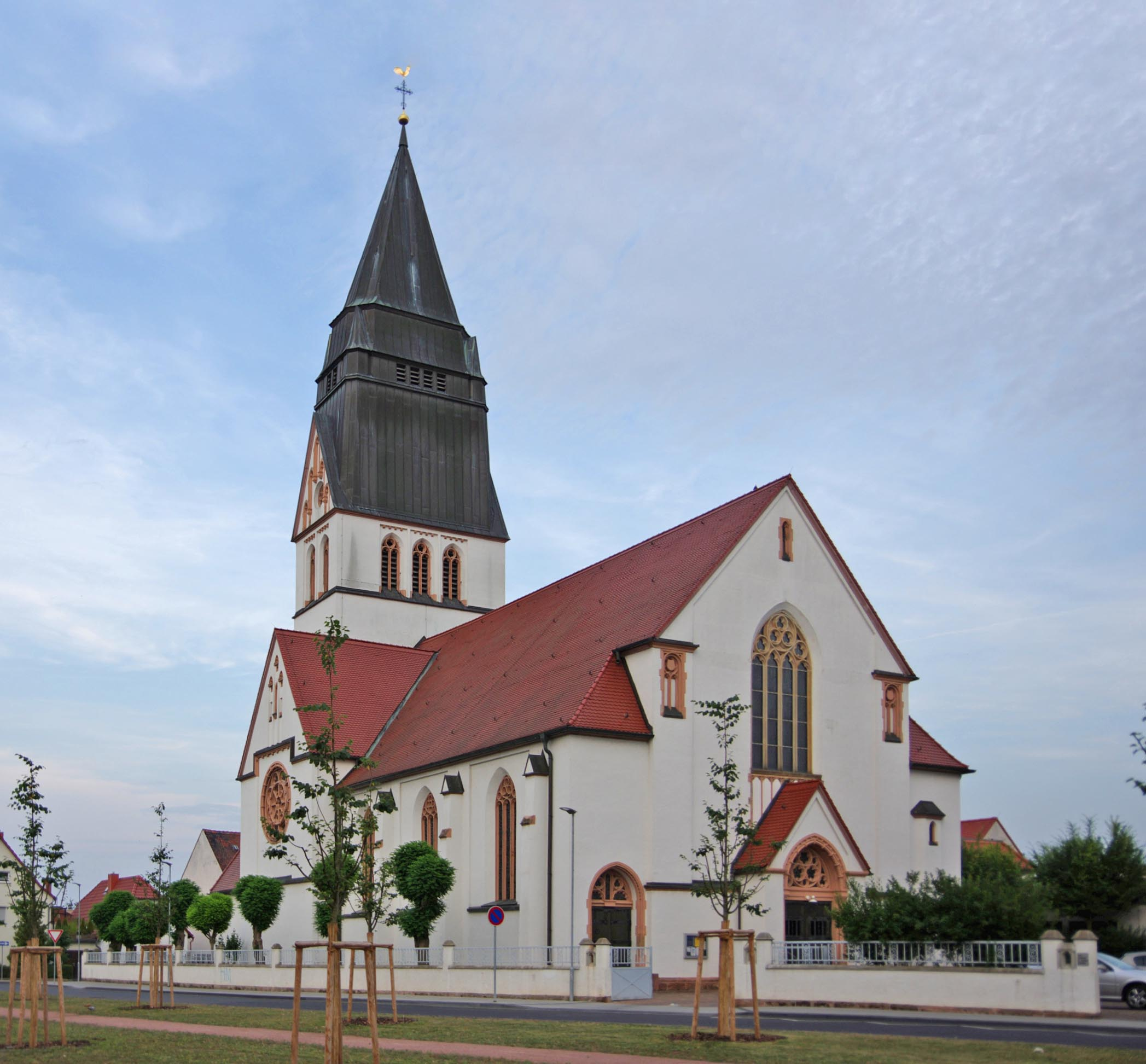 Lutherstadt Eisleben in Sachsen-Anhalt. Die Kirche St. Gertrud wurde 1914 erbaut. Sie steht unter Denkmalschutz.